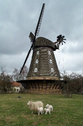 Galerieholländermühle, Britzer Mühle, Berlin